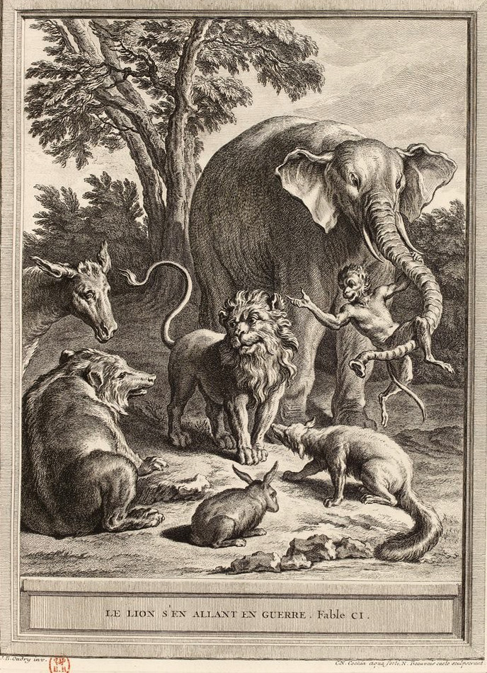 Gravure réalisée par Charles-Nicolas Cochin (II) et Nicolas-Dauphin de Beauvais d'après un dessin de Jean-Baptiste Oudry représentant la fable Le lion s'en allant en guerre de Jean de La Fontaine (fable 19 du livre V). Cette gravure est parue dans l'édition complète des fables de La Fontaine, parue en quatre tomes chez l'éditeur Desaint & Saillant, rue saint Jean de Beauvais à Paris, 1755-1759.